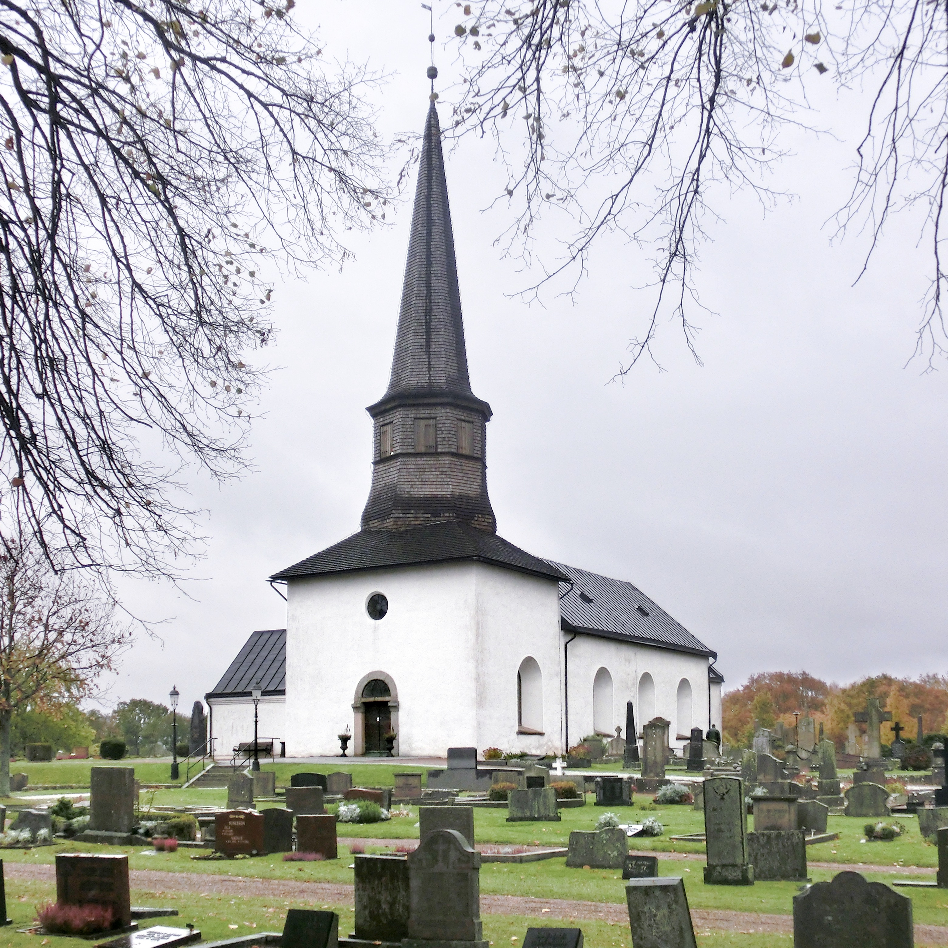 Söndrums kyrka i Söndrums socken, Halmstads kommun, Halland, Hallands län, Göteborgs stift, Sverige.